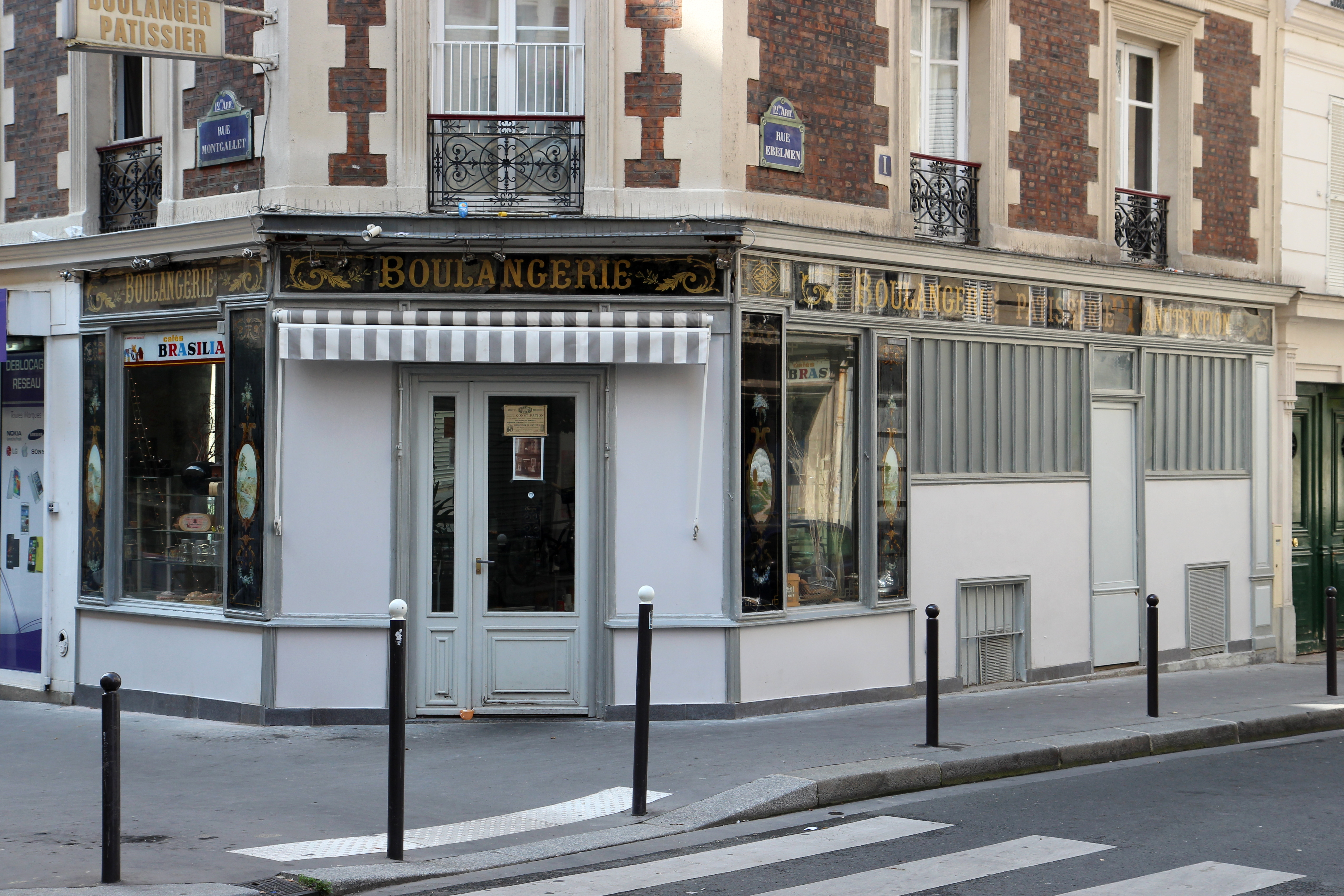 Boulangerie rue Montgallet à Paris ayant conservé des éléments de style ancien .